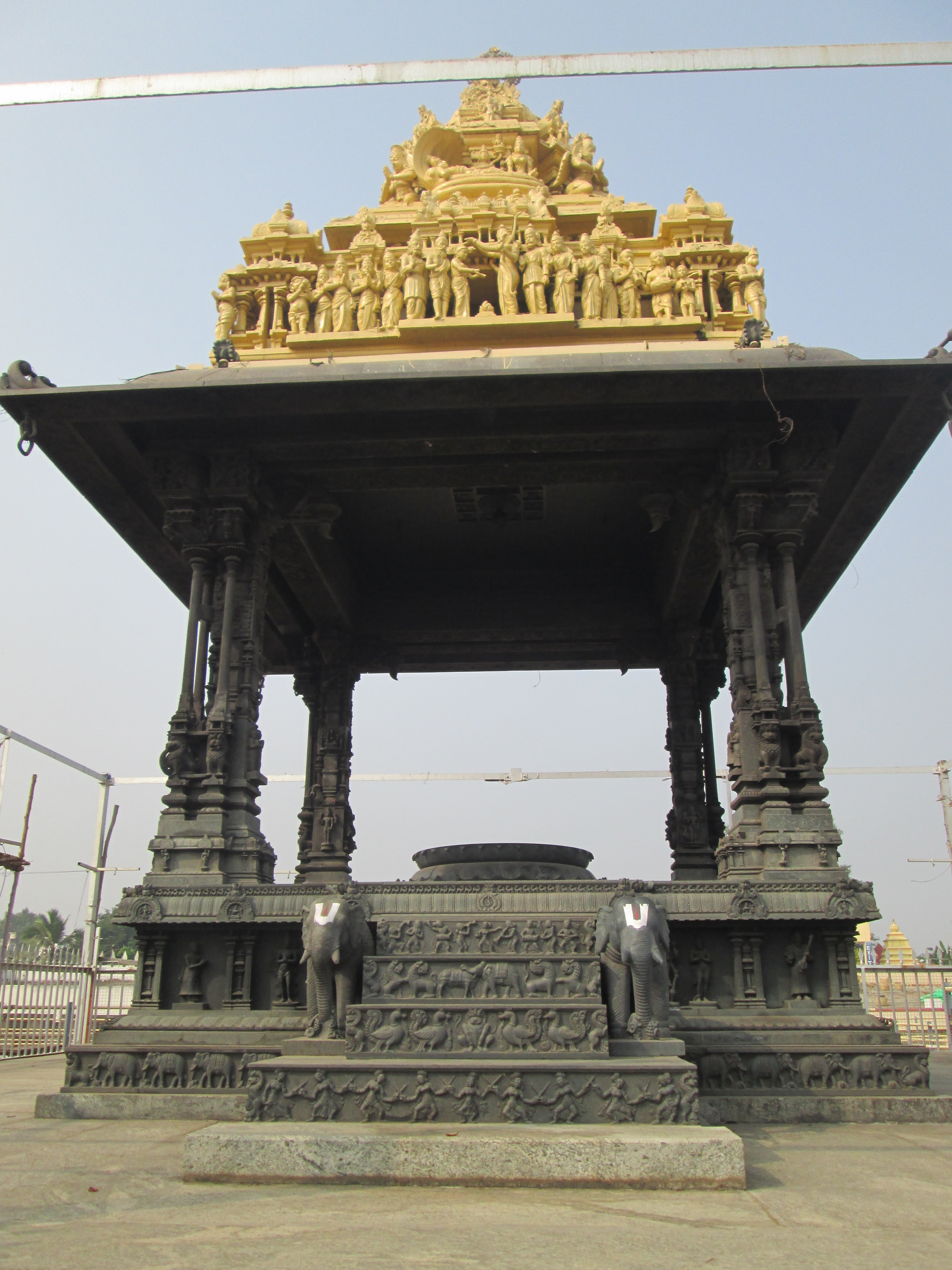 భద్రాచలం శ్రీ సీతారామచంద్ర స్వామి వారి దేవస్థానము